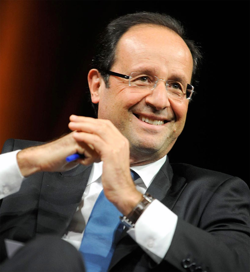 François Hollande et Stéphane Hessel aux Journées de Nantes, organisées par le Nouvel Observateur